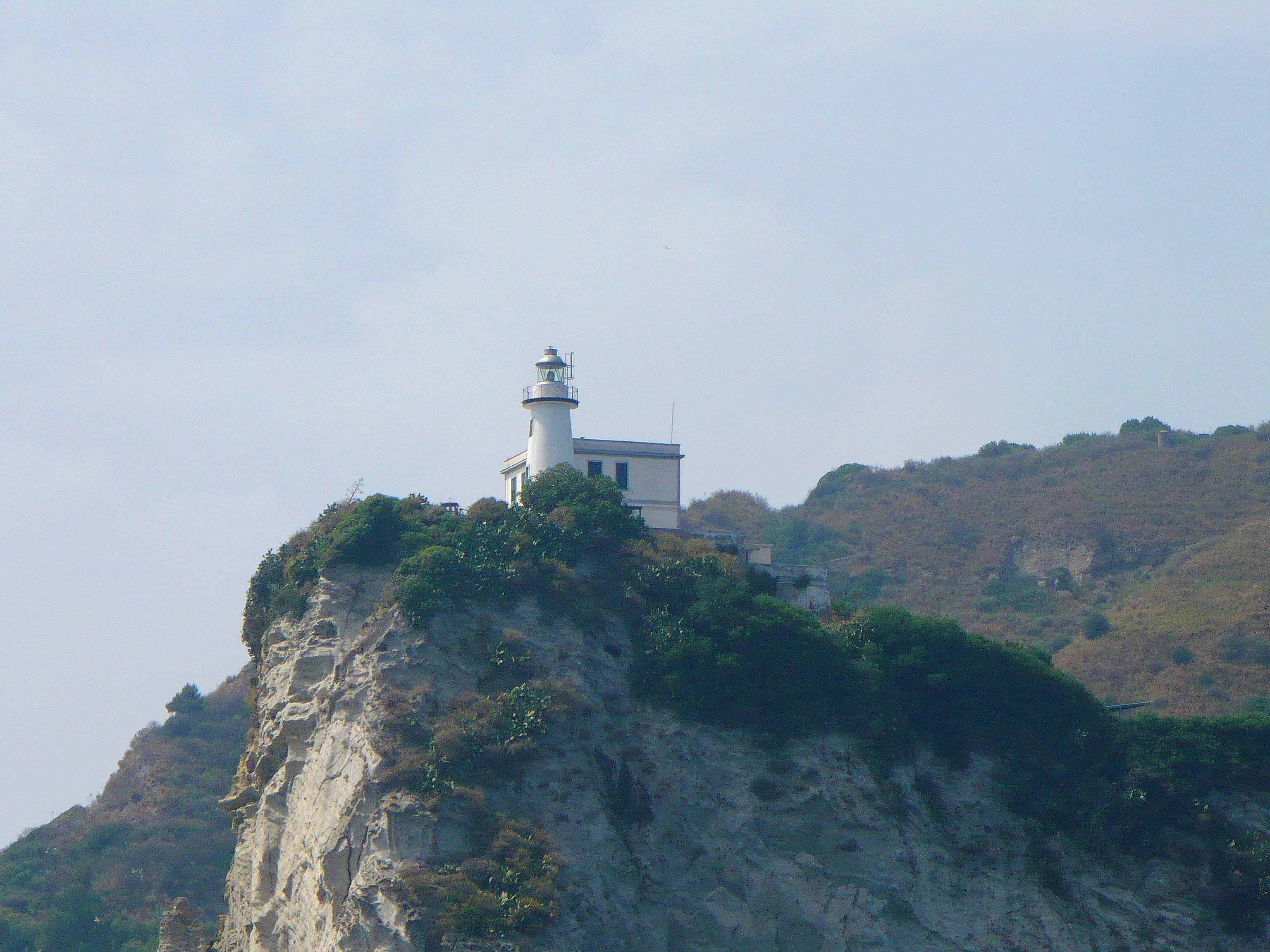 Faro collocato all'estremità del promontorio di Capo Miseno. Autore foto: Roberto De Martino